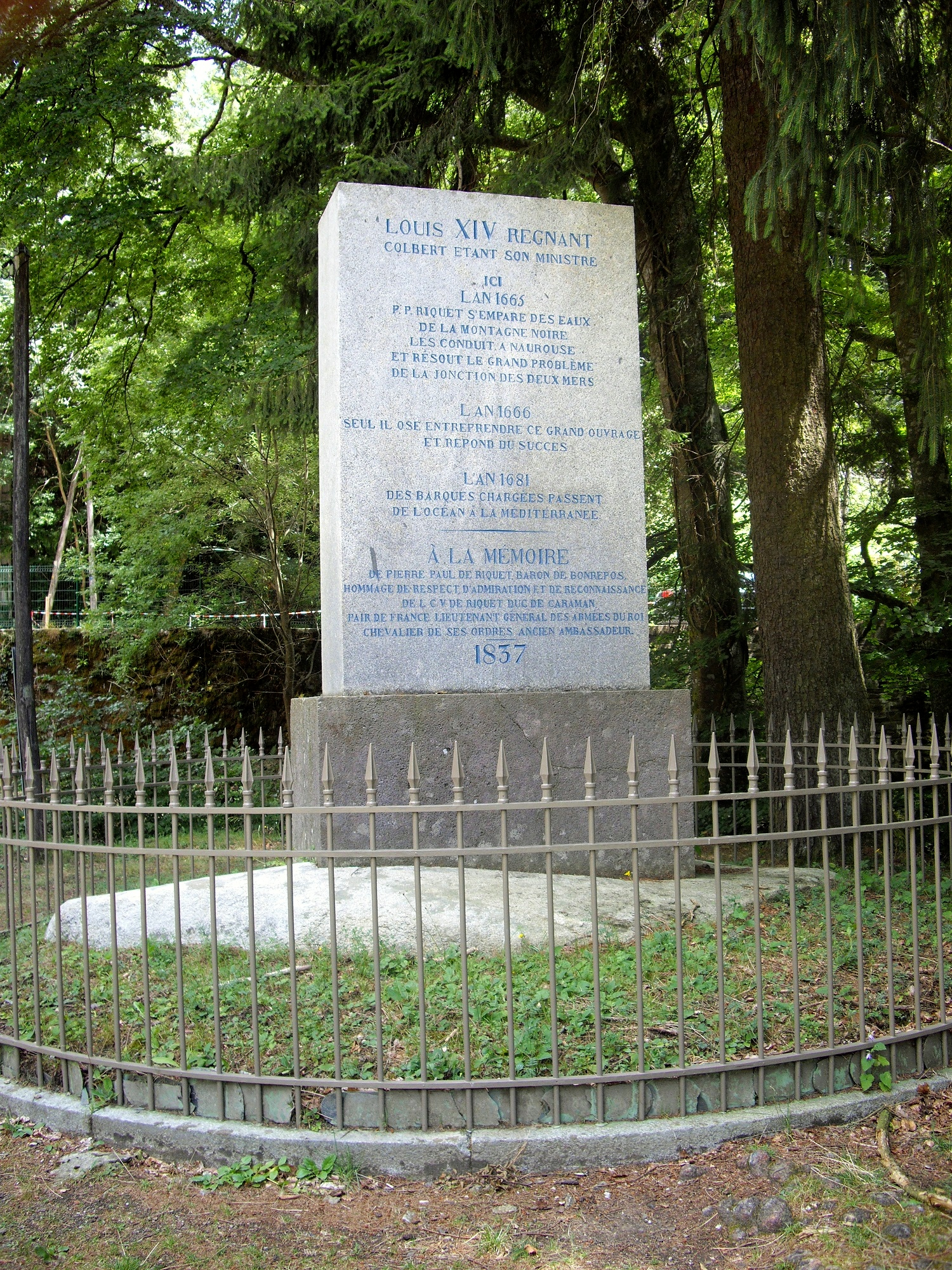 Prise d'Alzeau : stèle à la mémoire de Pierre-Paul Riquet.